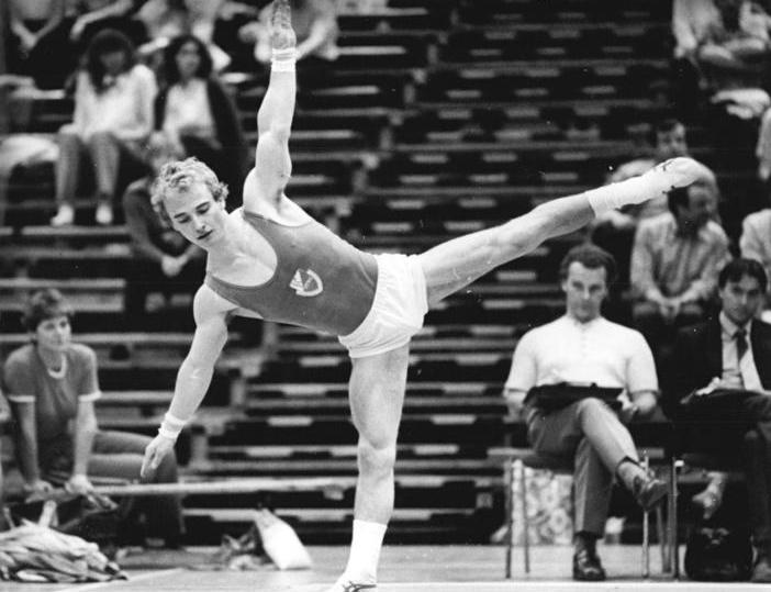 Jens Fischer ADN-ZB Kluge 31.5.84 Leipzig: 35. DDR-Meisterschaften im Turnen -Titelverteidiger Jens Fischer (hier am Boden) bot bei der ersten Kür am 30.5.84 in der Leipziger Messehalle 7 eine ausgeglichene Serie. Der 21jährige Cottbuser führt damit nach der ersten Kür die Konkurrenz mit 115,10 Punkten an.